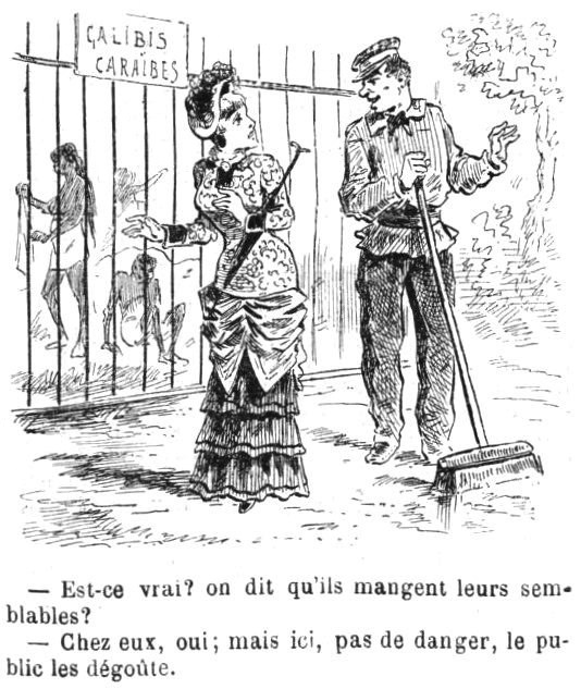 Caricature de Draner à propos des Galibis à Paris.